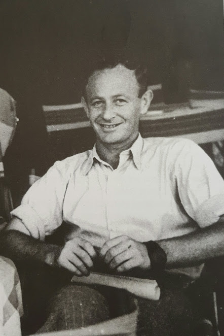 צבי זוירי